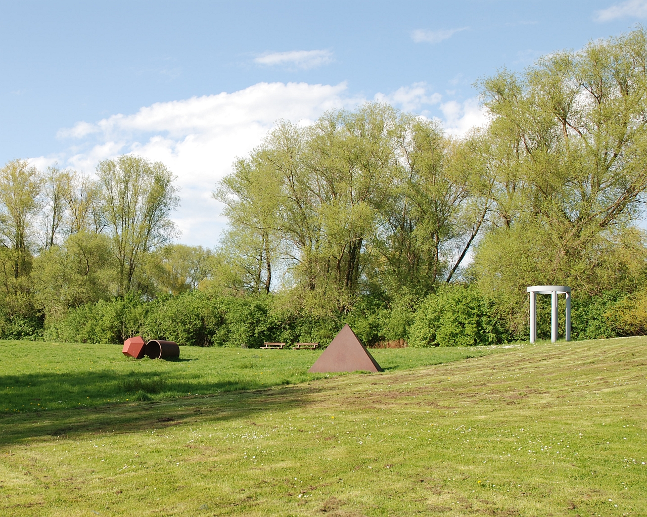 Skulpturen-Installation von Stephan Kern auf der Insel im Salzgittersee, Salzgitter. Sechs Objekte aus Marmor bzw. Stahl über ein Areal verteilt, 1988 aufgestellt.